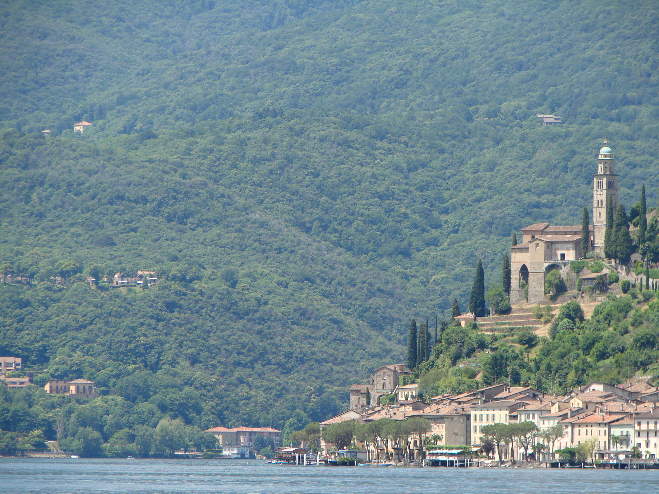 Vue du village de Morcote (Tessin) avec église Santa Maria del Sasso